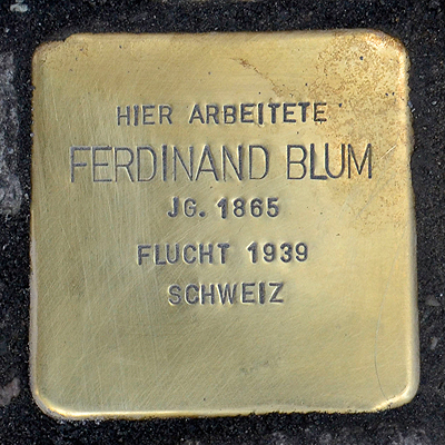 Stolperstein Paul Ehrlich Str 42 Blum Ferdinand